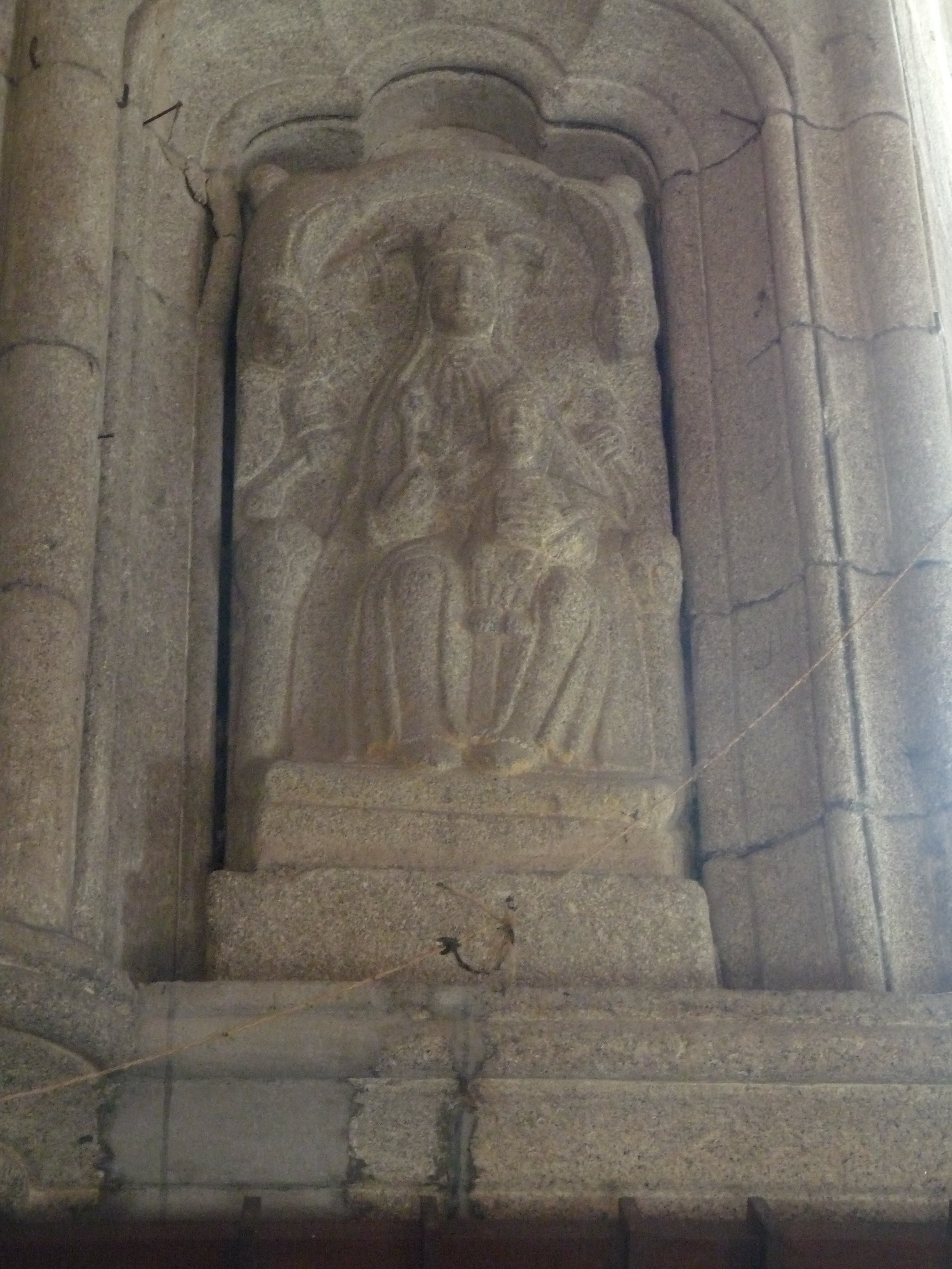 Haut-relief en granit représentant une Vierge à l'Enfant assise datant du XIIIe siècle située dans l'église du Grand-Bourg (Creuse) et classée en tant qu'objet monument historique.